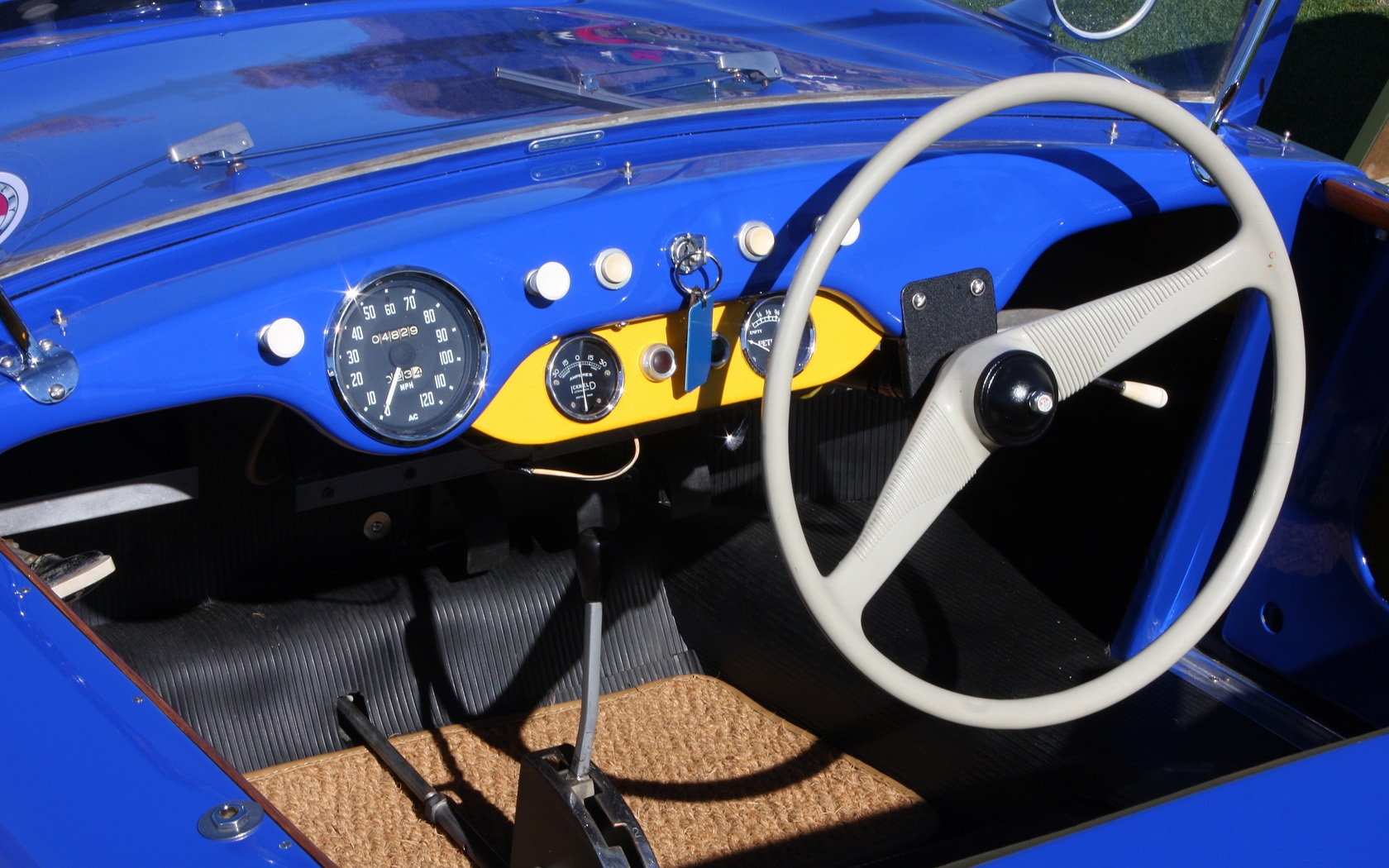 1958 Berkeley - int